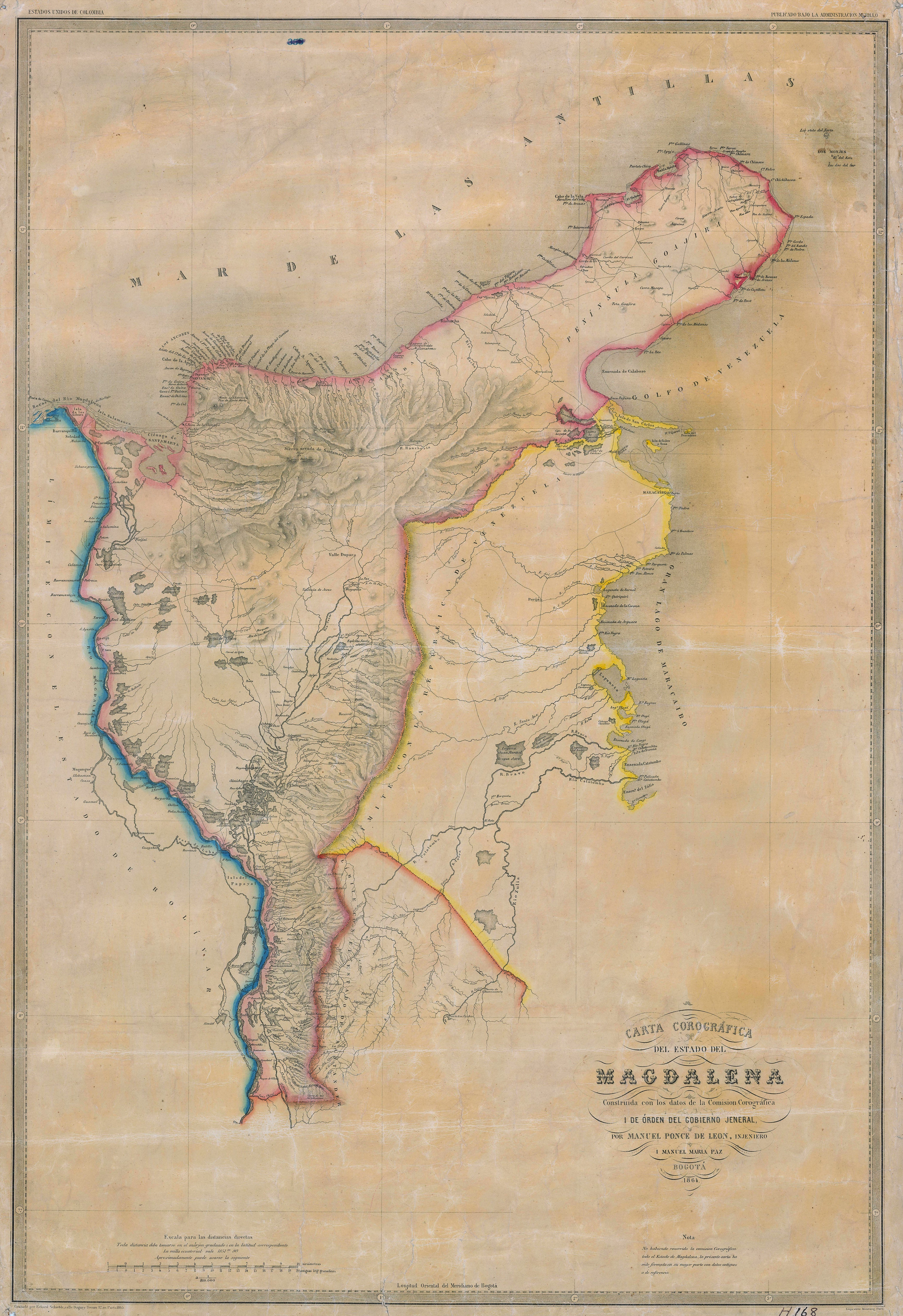 Carta Corográfica del Estado Soberano del Magdalena. Tomado del "Atlas de los Estados Unidos de Colombia, antigua Nueva Granada", 1865.